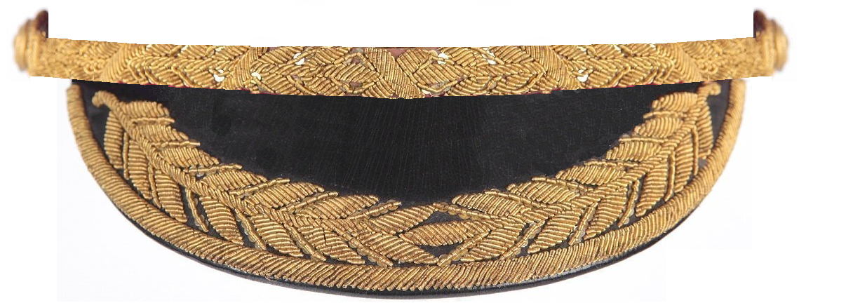 шитье на козырьке